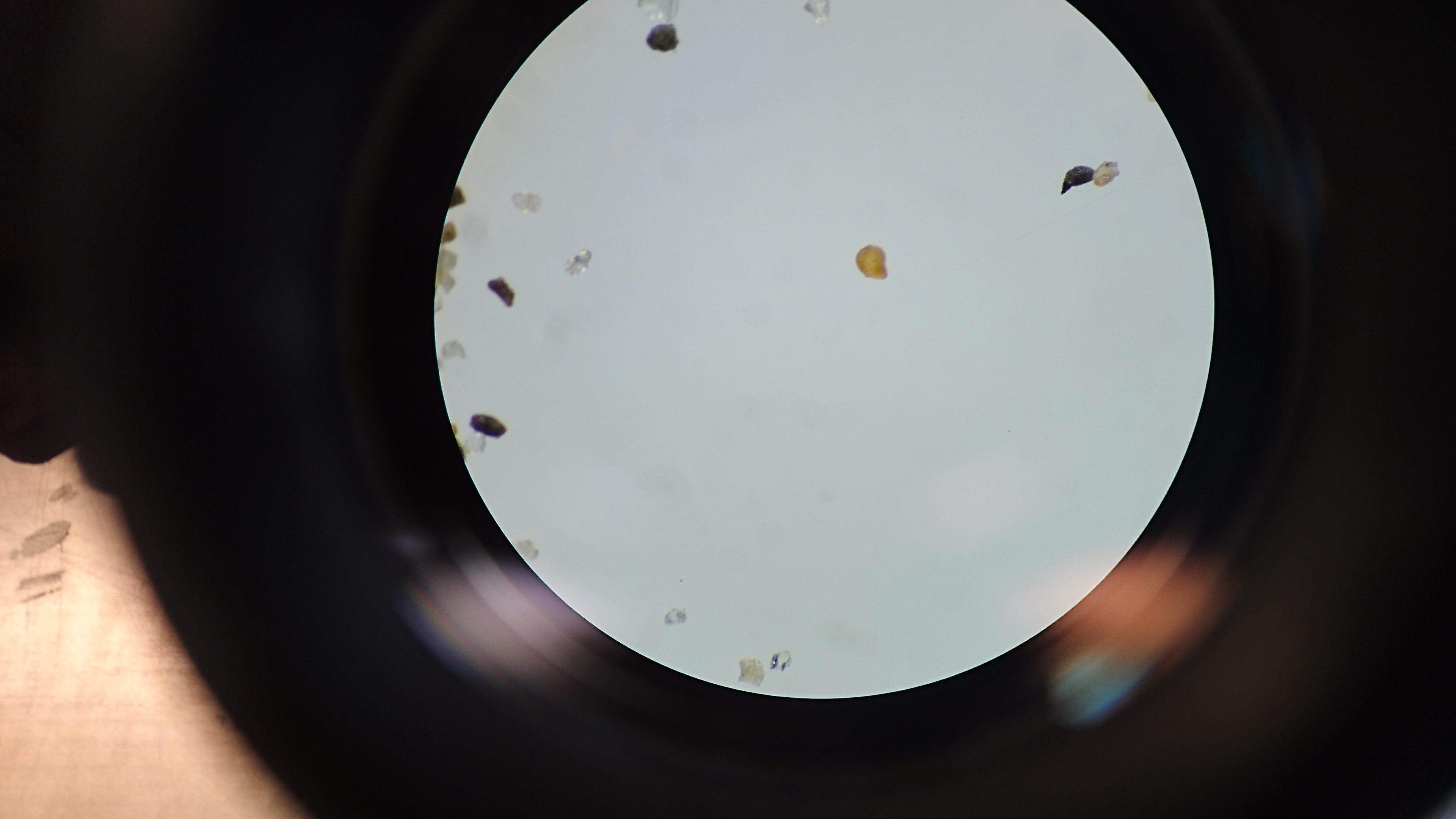 Foraminifero visto desde el microscopio de aumento